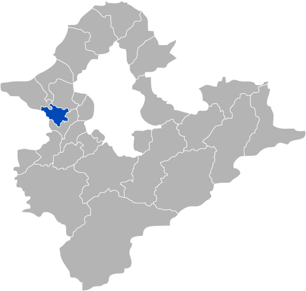 中華民國臺灣省台北縣泰山鎮，KaurJmeb為編寫台北縣泰山鎮所繪製。